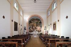 Eglise du Christ Travailleur